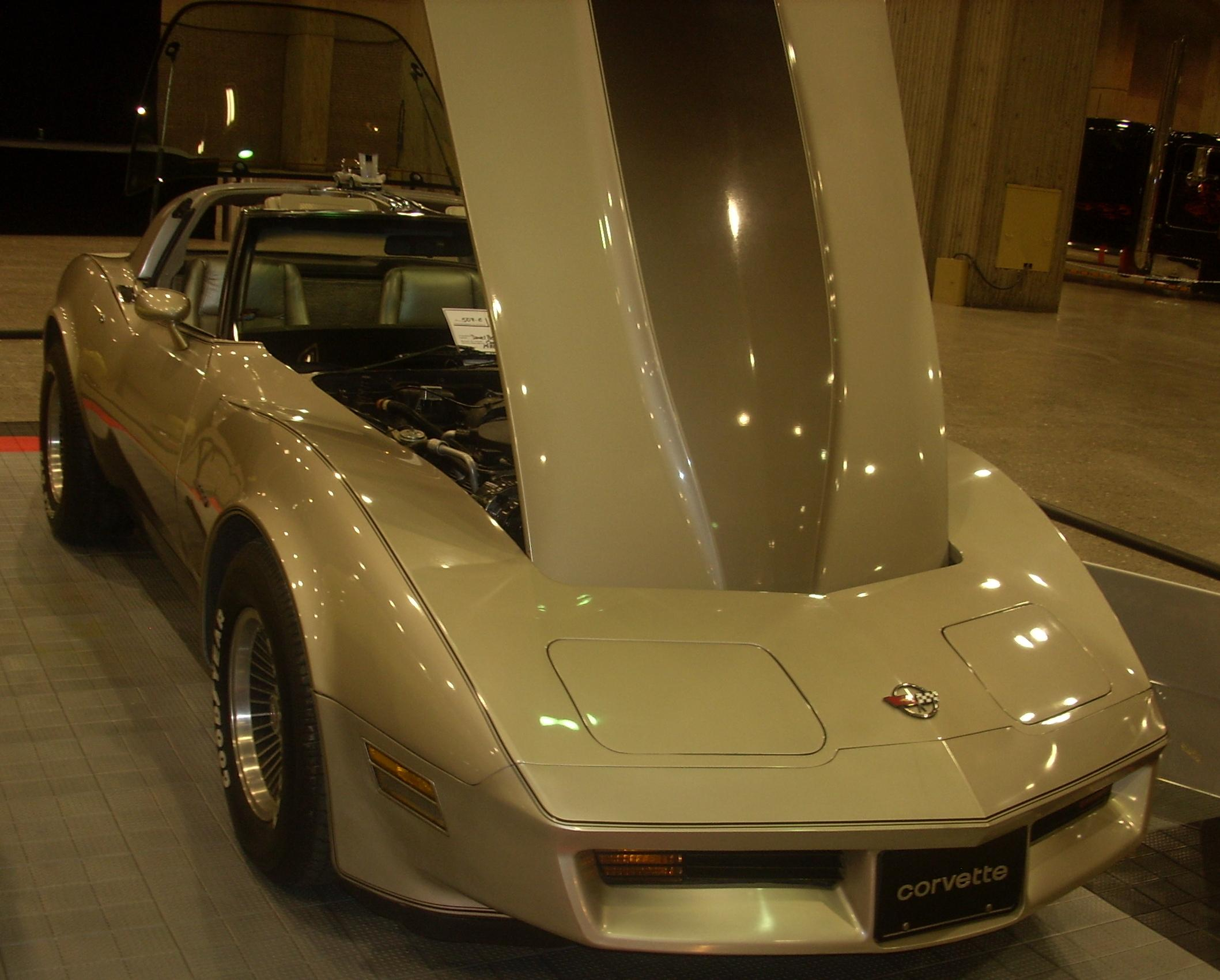 1982 Chevrolet Corvette photographed at Auto classique Montréal 2008.